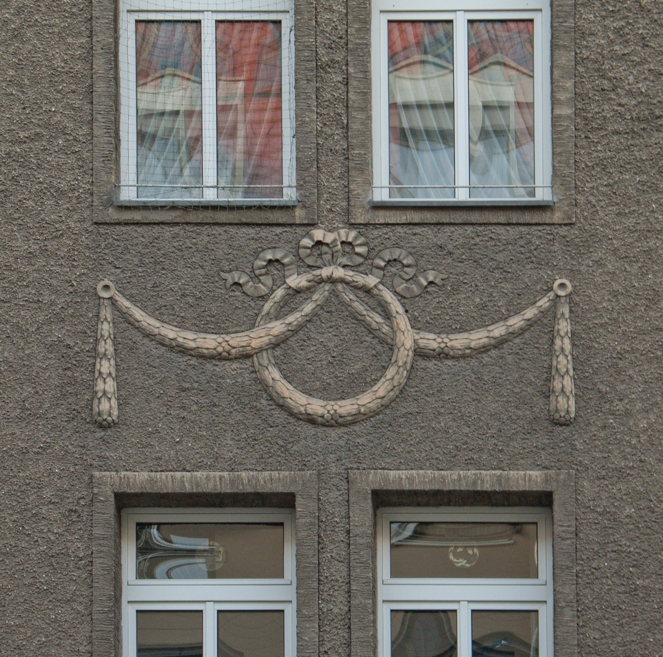 Nürnberg-St. Johannis, Mietshaus Rilkestr. 19. Stuck-Feston an der Fassade zur Rilkestraße.